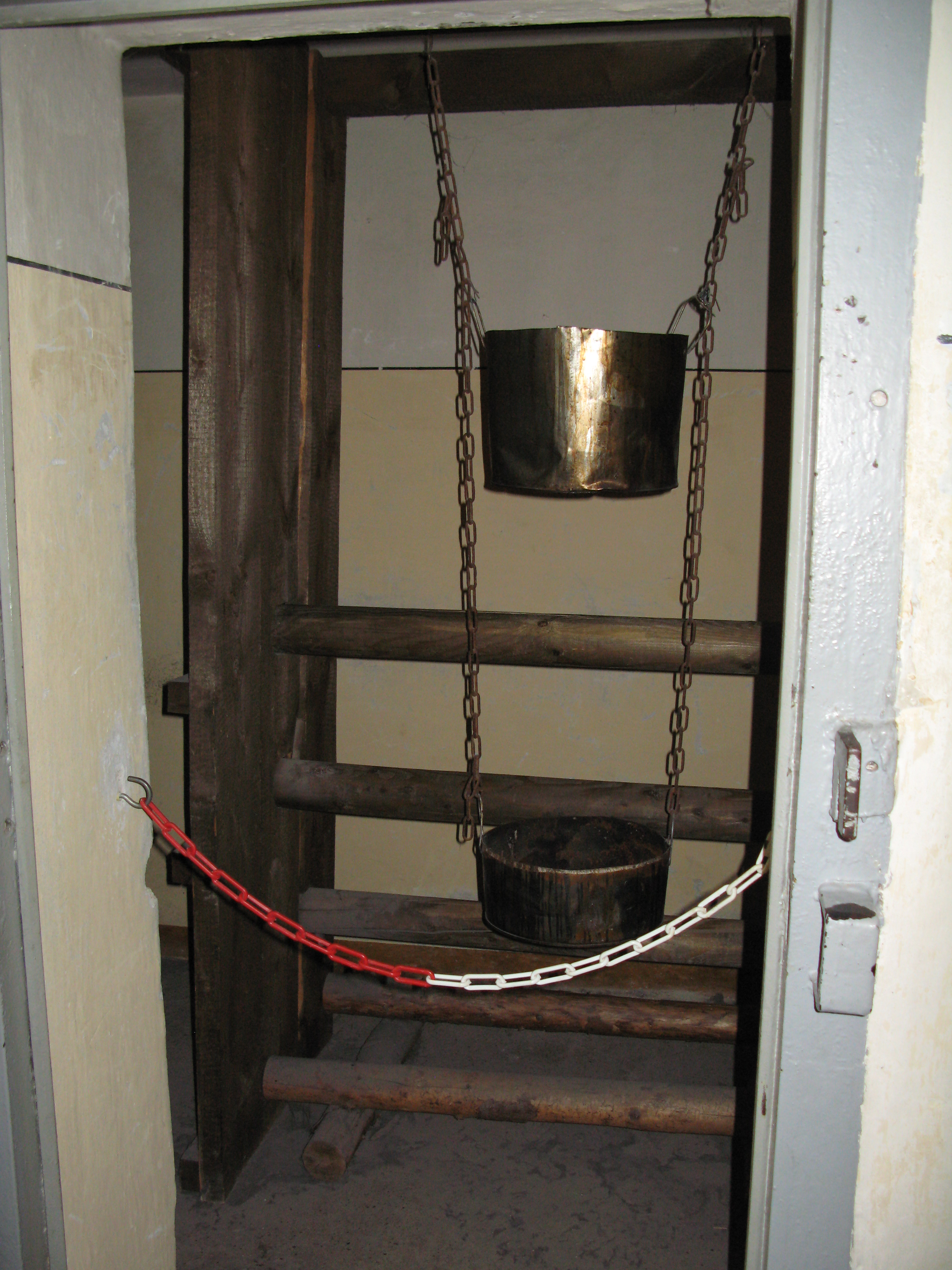 Celda de agua en prisión Berlín Hohenschönhausen.